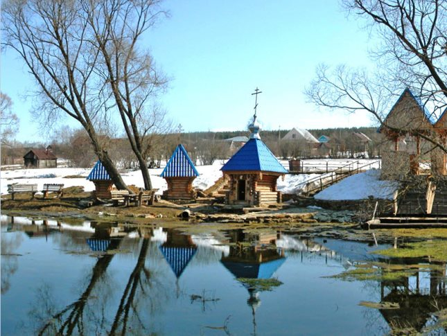 крыцнкц